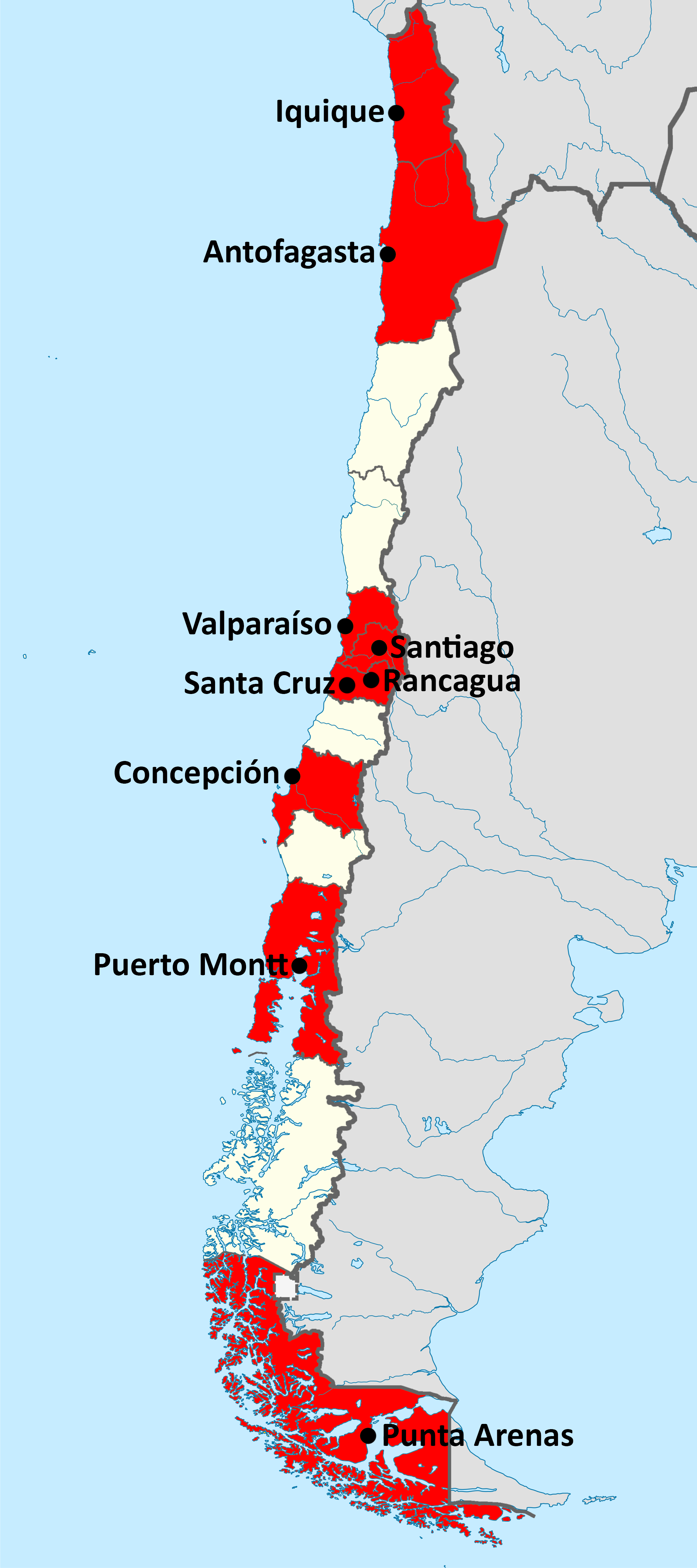 Mapa con la ubicación de las ciudades que visitó Fidel Castro en Chile en 1971, con sus respectivas provincias en color rojo.